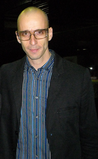 Cazé Peçanha no Campus Party 2010.